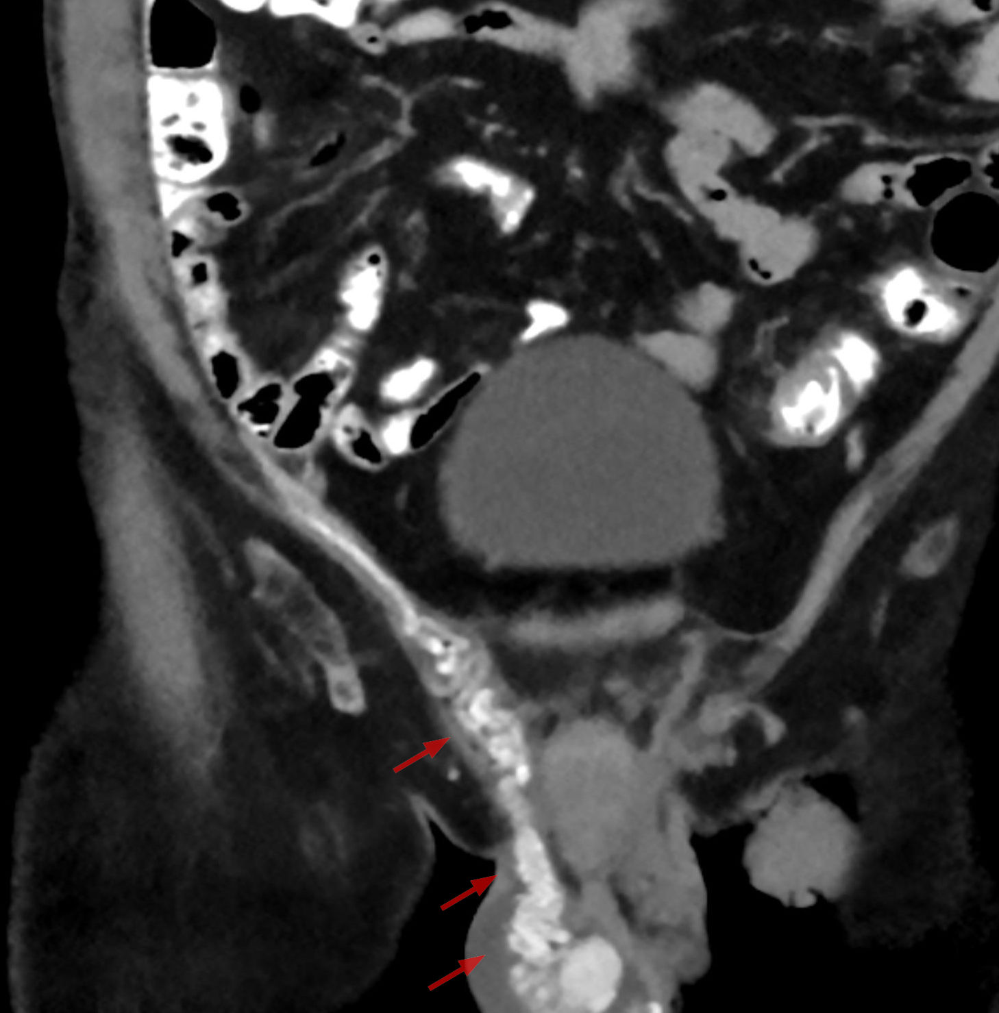 Varikozele in der Computertomographie koronar rekonstruiert. Man erkennt gut die erweiterten, geschlängelt verlaufenden Venen im Verlauf des Samenstrangs.